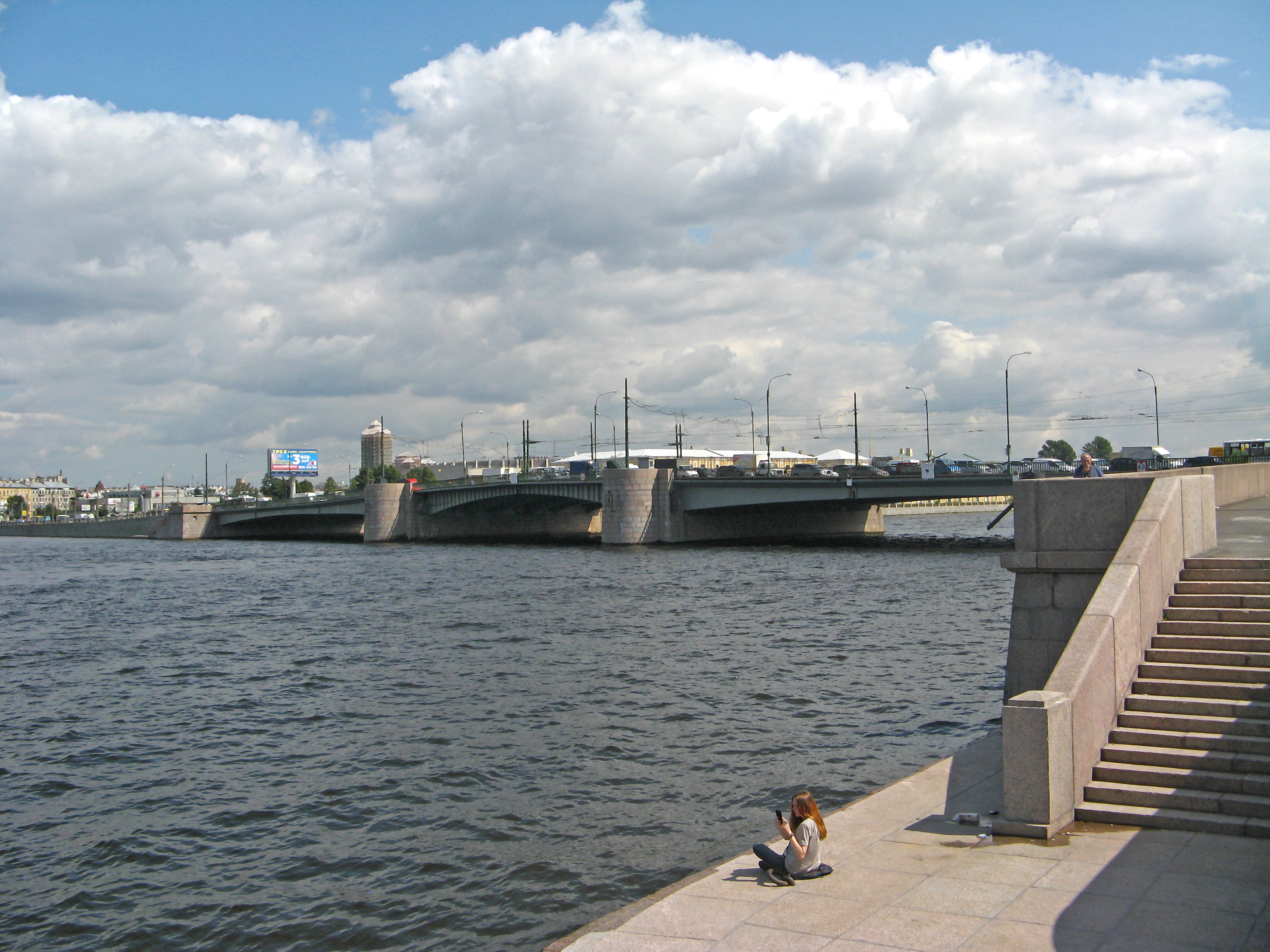 Тучков мост в Санкт-Петербурге